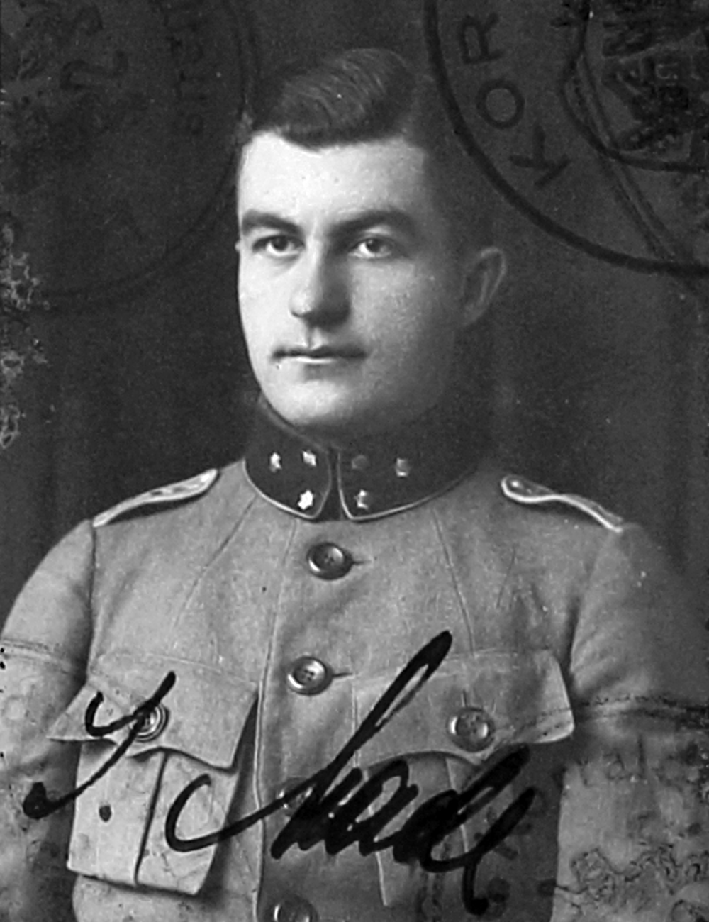 Julius Made